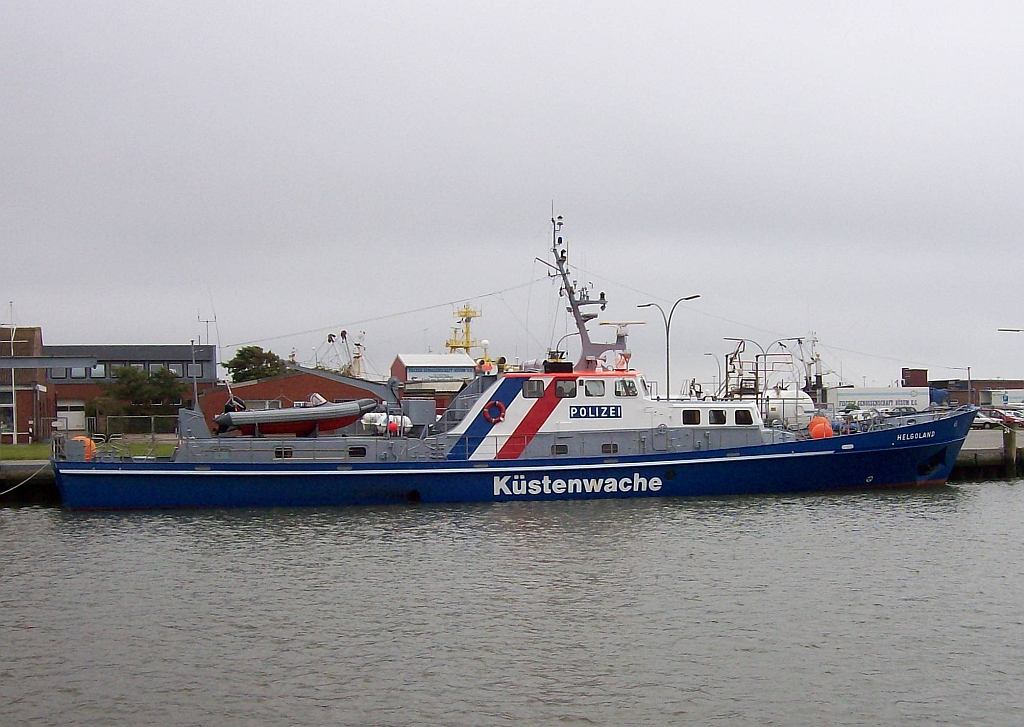 Küstenwache “Helgoland”, Büsum (Germany)